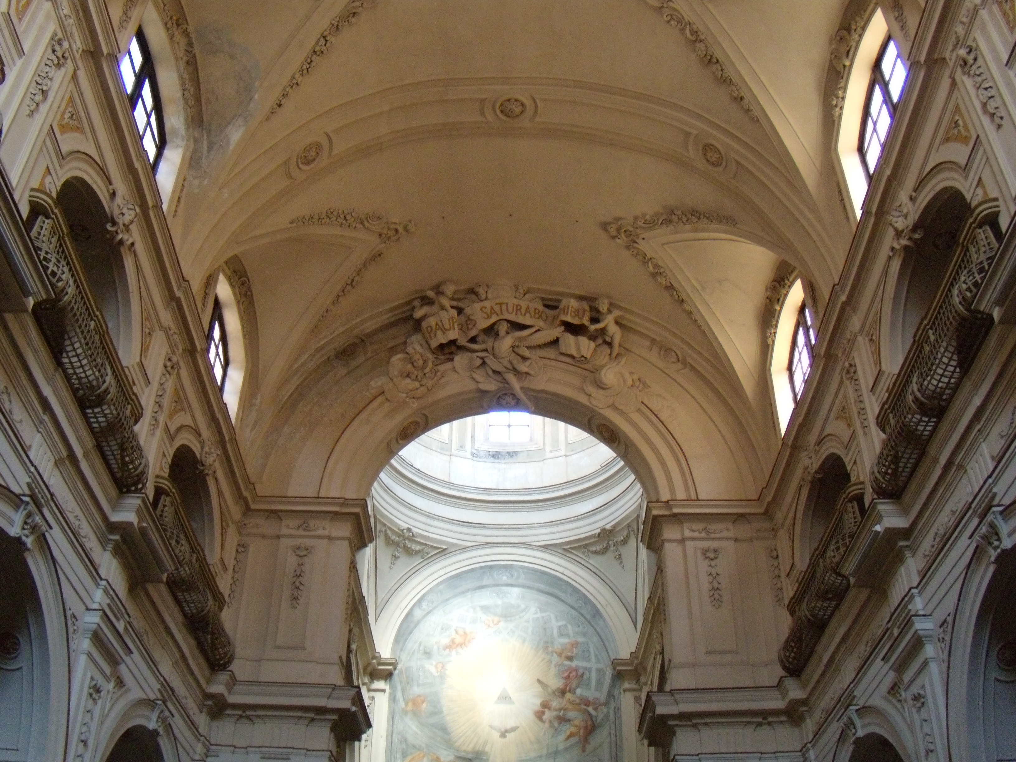 Interno della Chiesa di S. Maria della Purificazione, nell'Albergo delle Povere (Palermo)